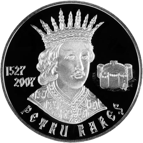 Реверс памятной монеты "480 лет cо дня вступления на престол Петра IV Рареша"